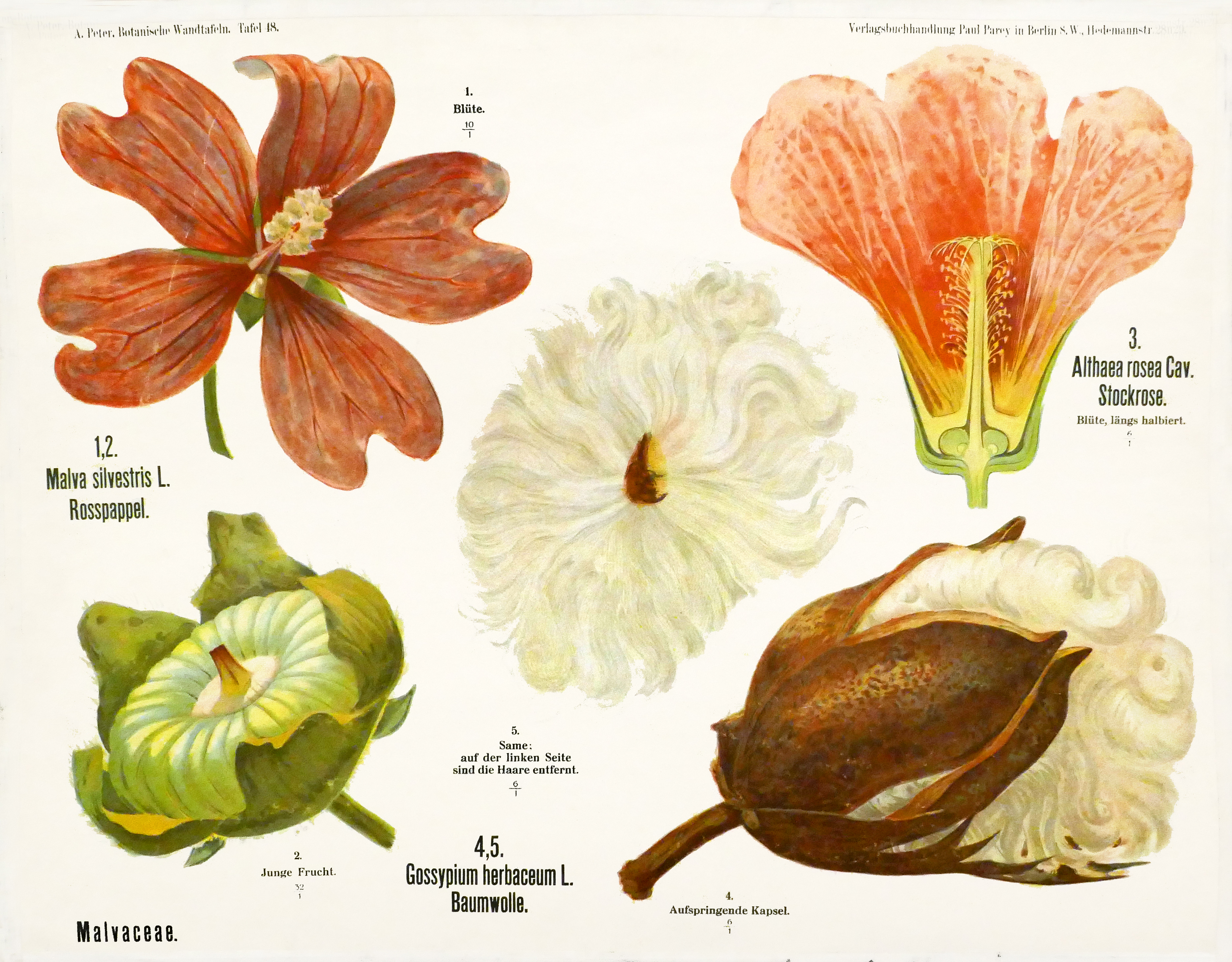 Léopold Kny et Albert Peter (fabricants). Planches botaniques murales ou Botanische Wandtafeln. Verlagsbuchhandlung Paul Parey. Berlin. Fin du 19e s. début du 20e s. Herbier de l'université de Strasbourg. Exposition Laboratoire d'Europe Strasbourg, 1880-1930 au Musée d'art moderne et contemporain de Strasbourg.